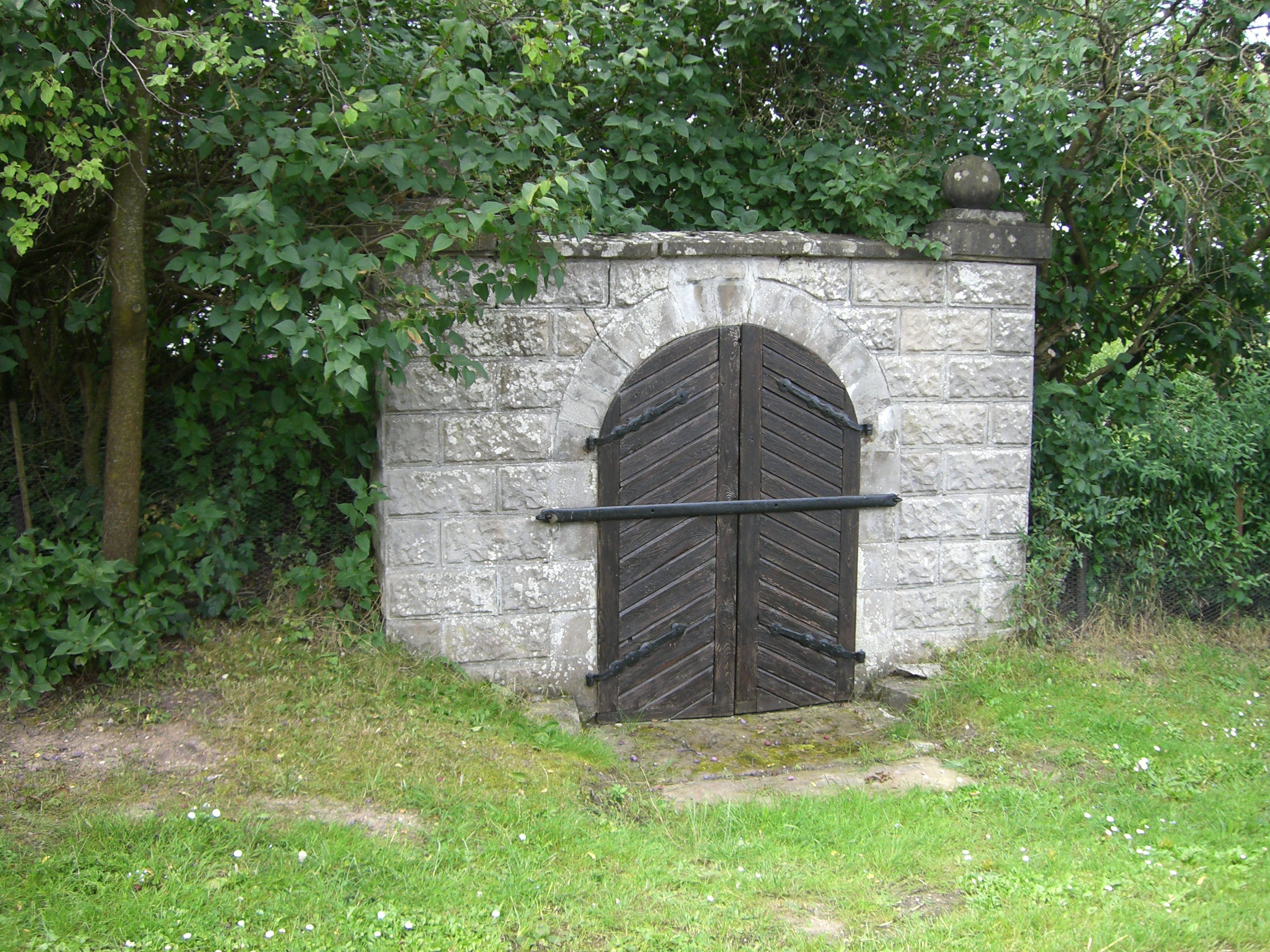 Gemauerter und renovierter Kellereingang in Wiebelsheim